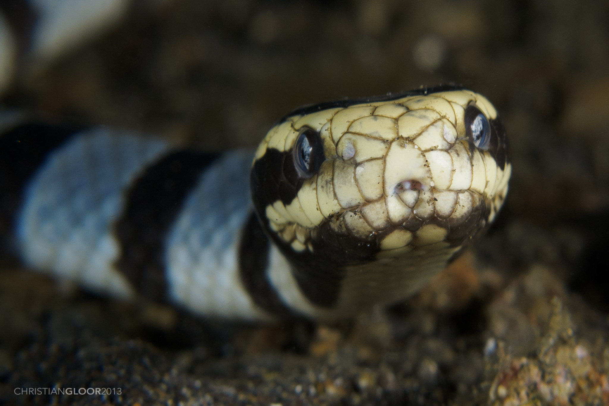 Banded Sea Snake / Laticauda laticaudata